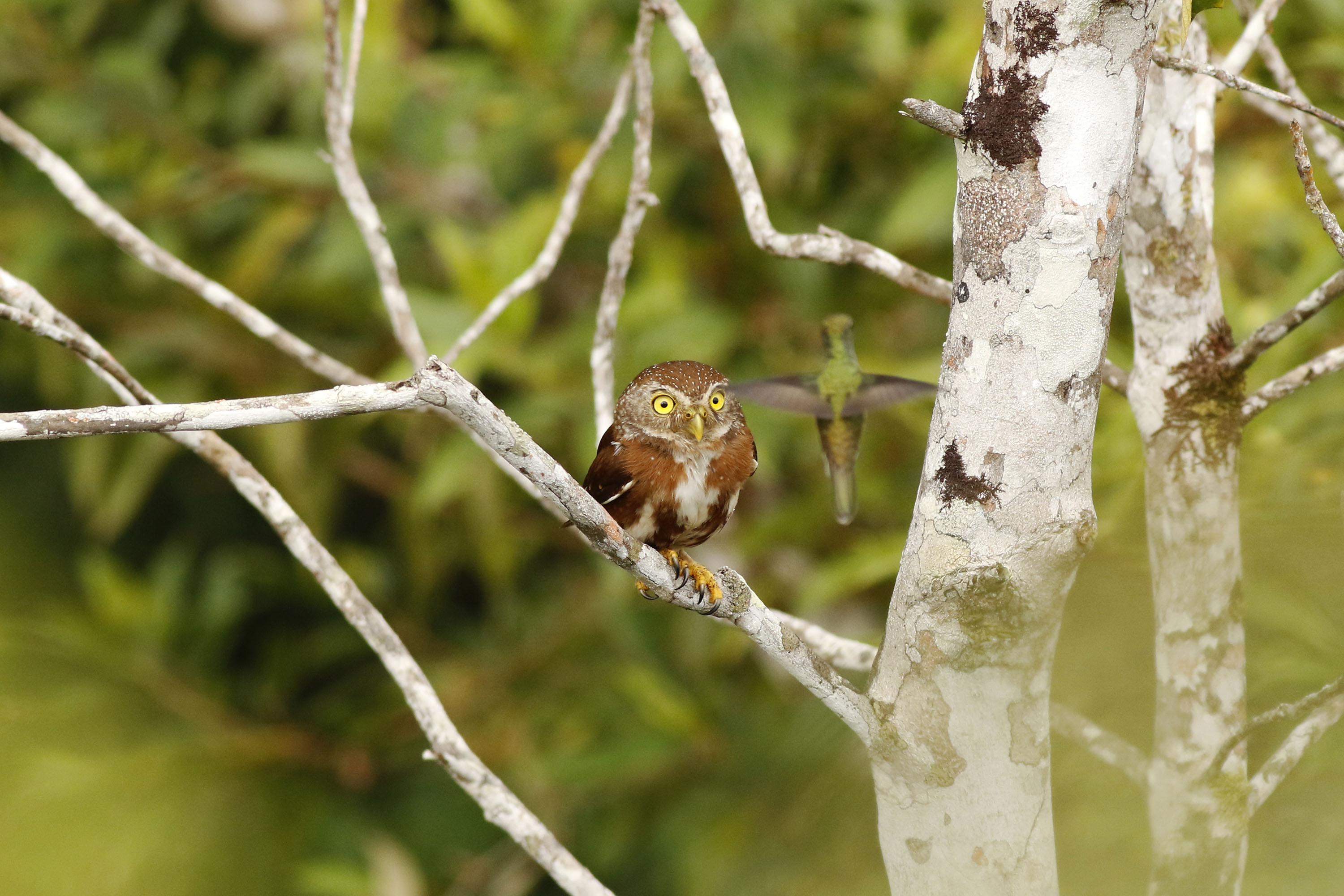 Caburé miudinho (Glaucidium minutissimum) observando um beija-flor